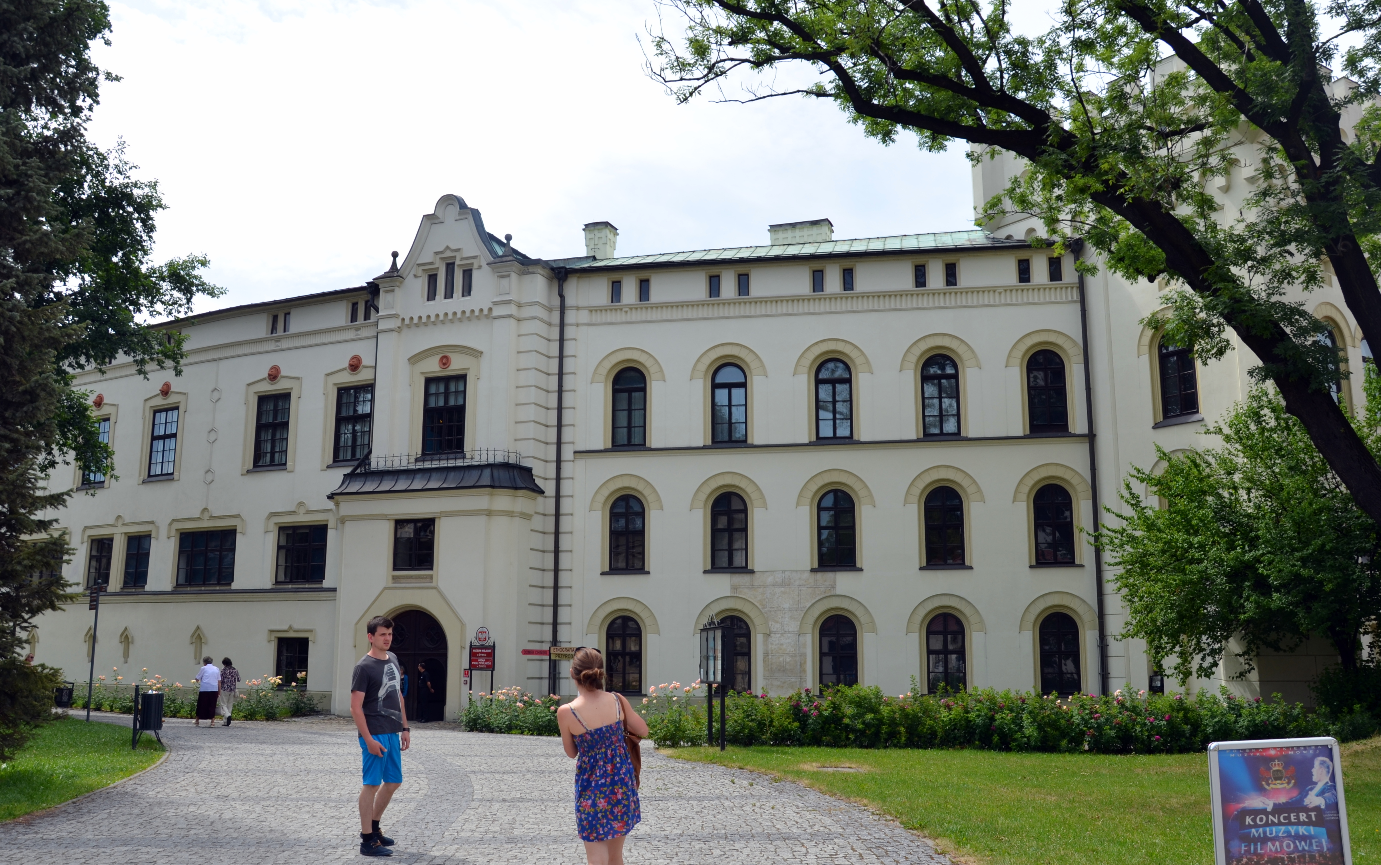 Habsburger Schloss Zywiec-Saybusch